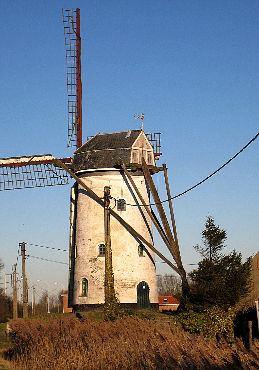 Wandmilen vun Hoeke (Westflandern)